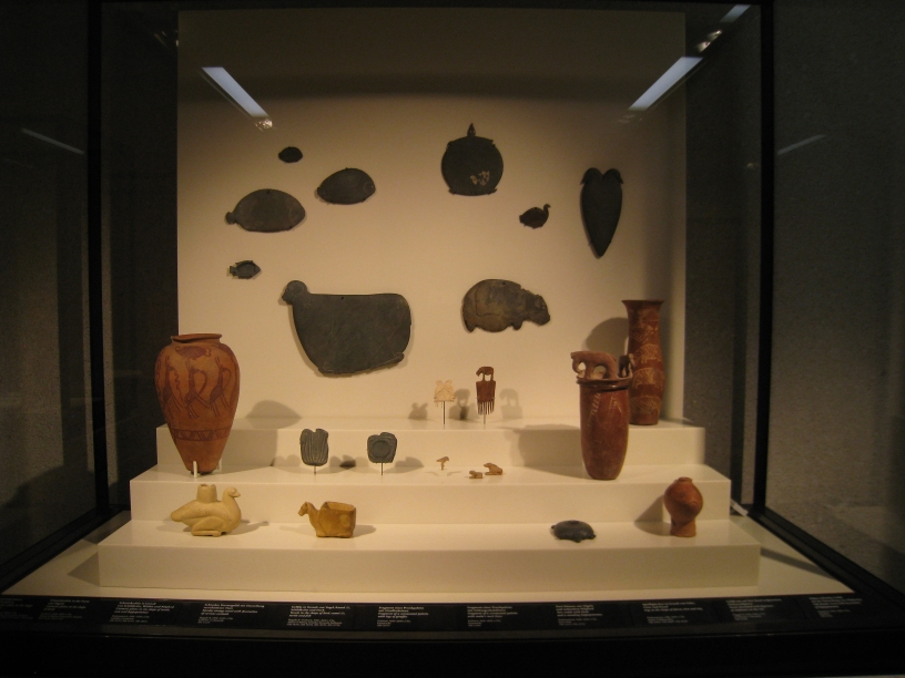 Palettes, céramiques et statuettes de la culture Nagada - Musée égyptien de Berlin